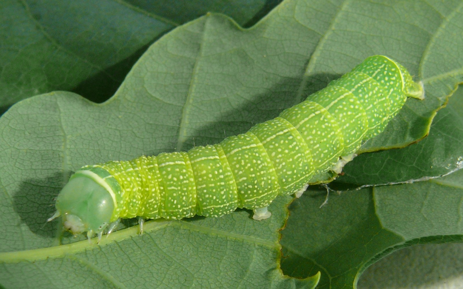 Orthosia cerasi (Fabricius, 1775)